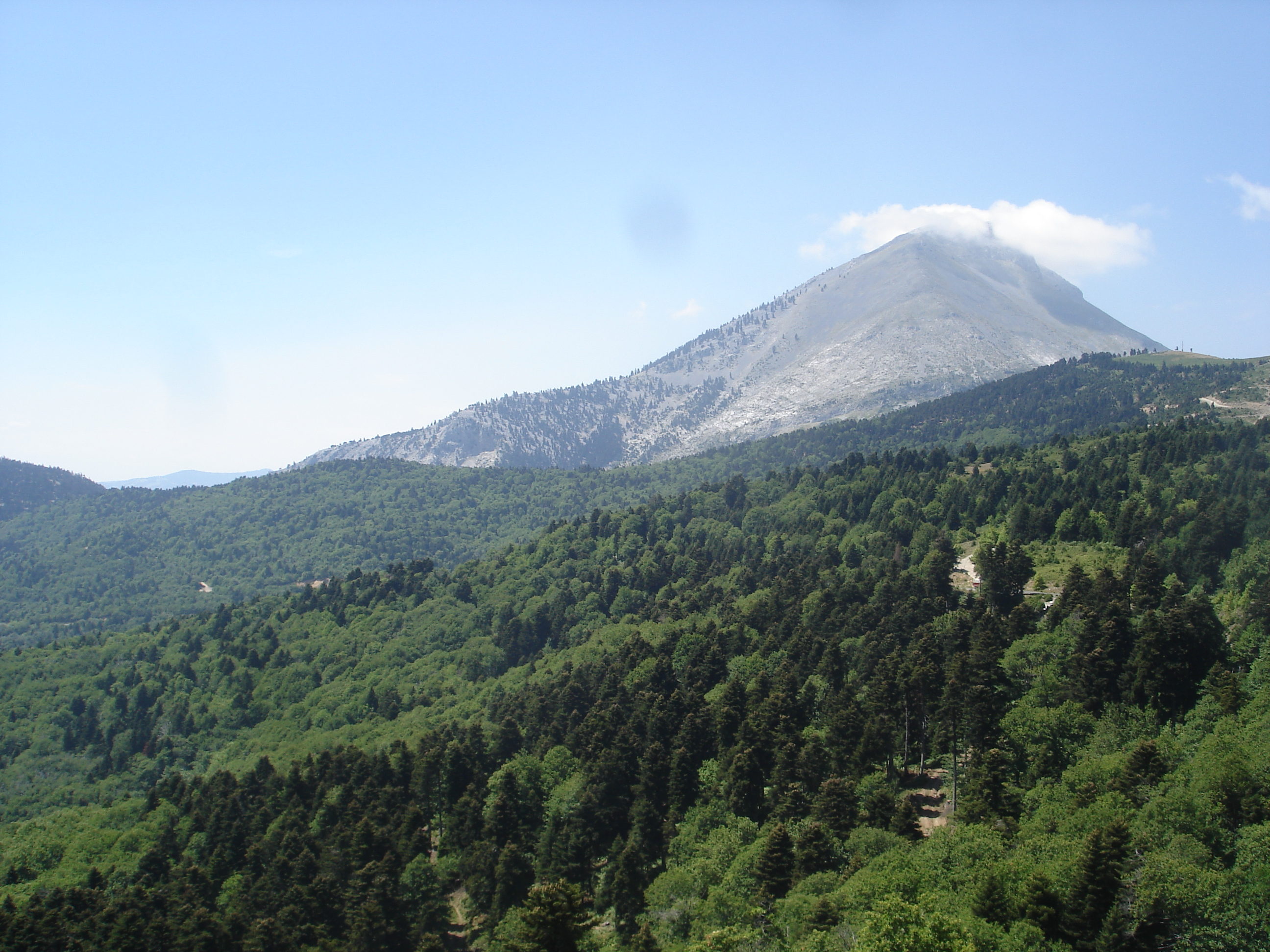 Mont Delphy en Eubée (Greece) centre de l'ile. Photo prise de la ville de Steni.